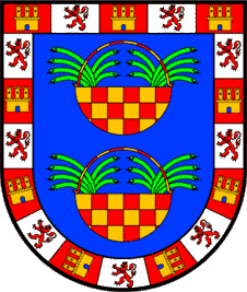 SVG file